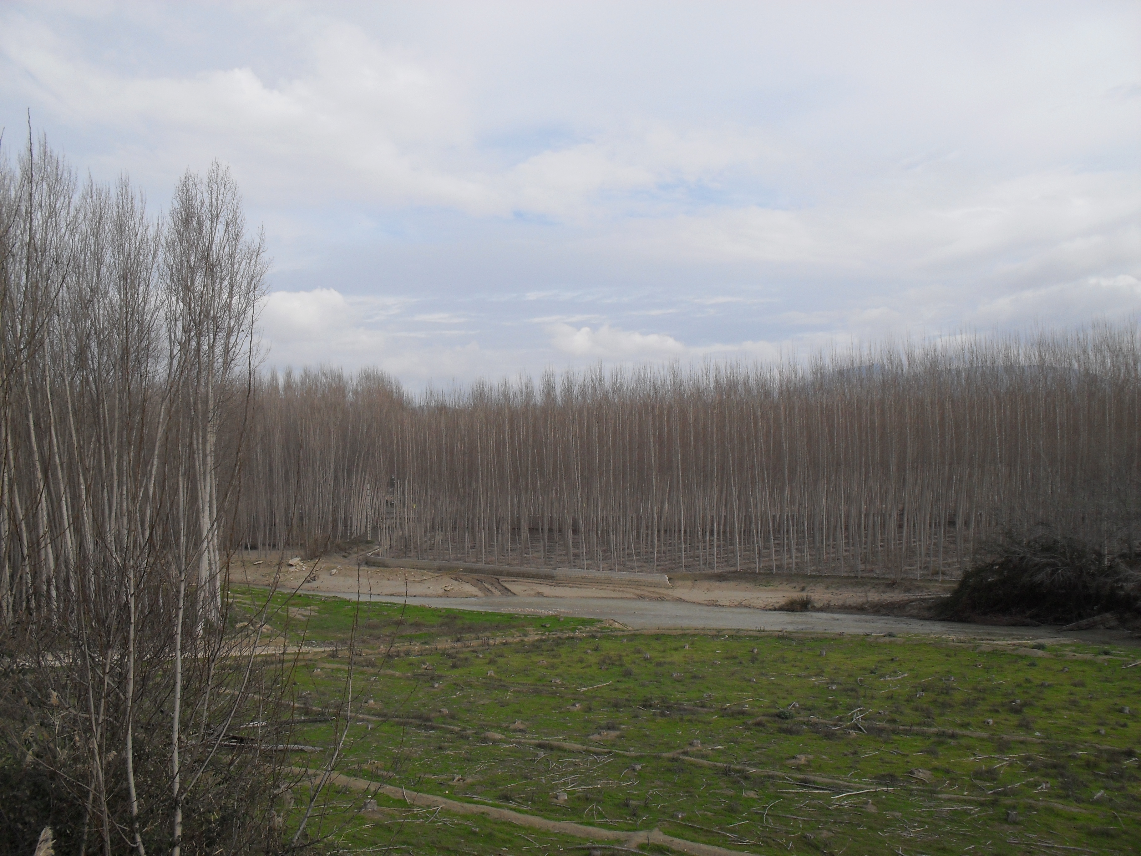 Vista del río Cacín a su paso por Huétor-Tájar, concretamente en Las Torres.